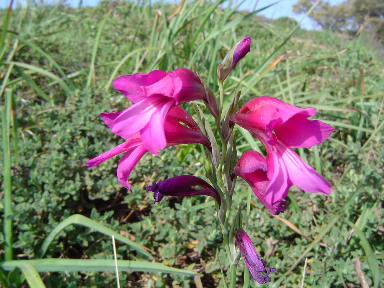 Gladiolus illyricus, Ceuta, España